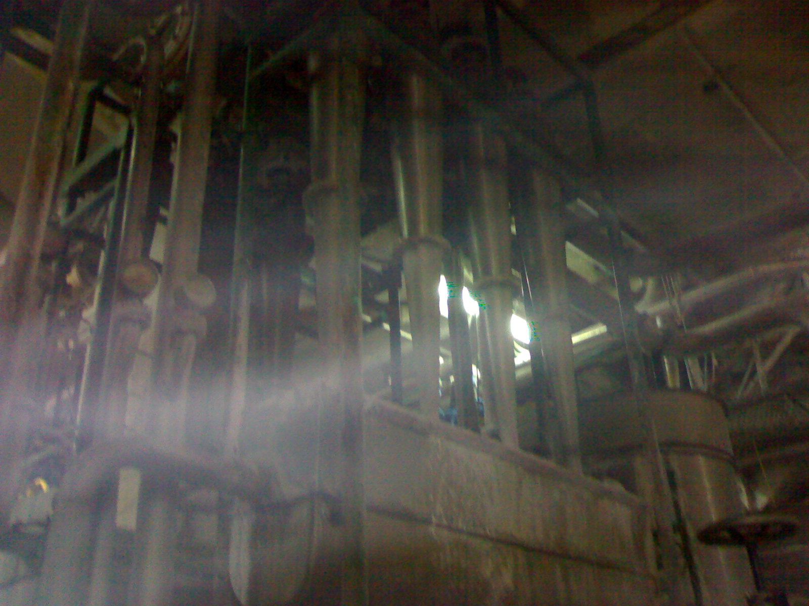 Ciclones, depuradores de cabeza de máquina